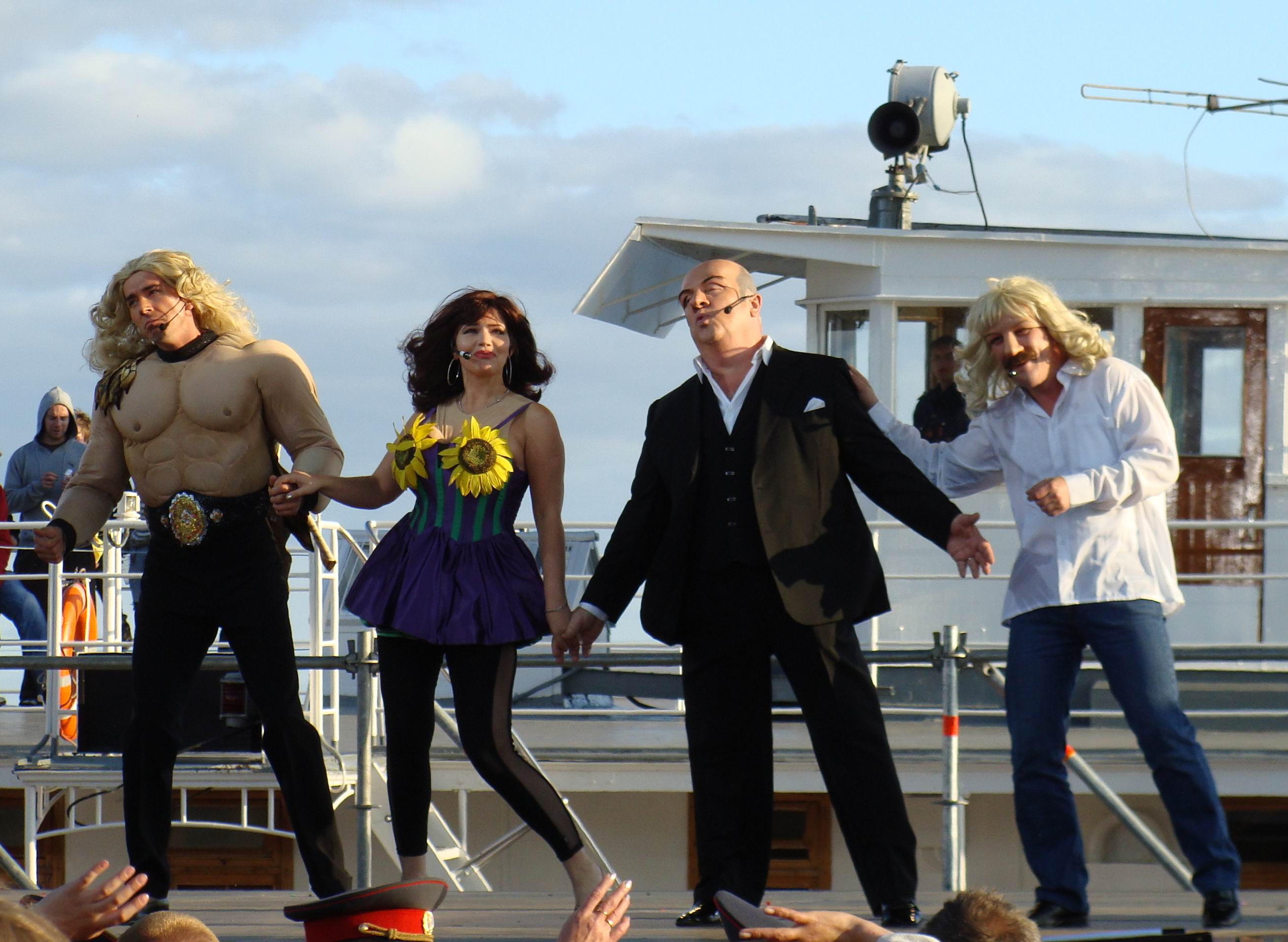 Театр пародий Владимира Винокура в Архангельске выступает совместно с программой Регины Дубовицкой - "Аншлаг" на юбилее, 425-летии города, в воскресенье, летом 28 июня 2009 года.